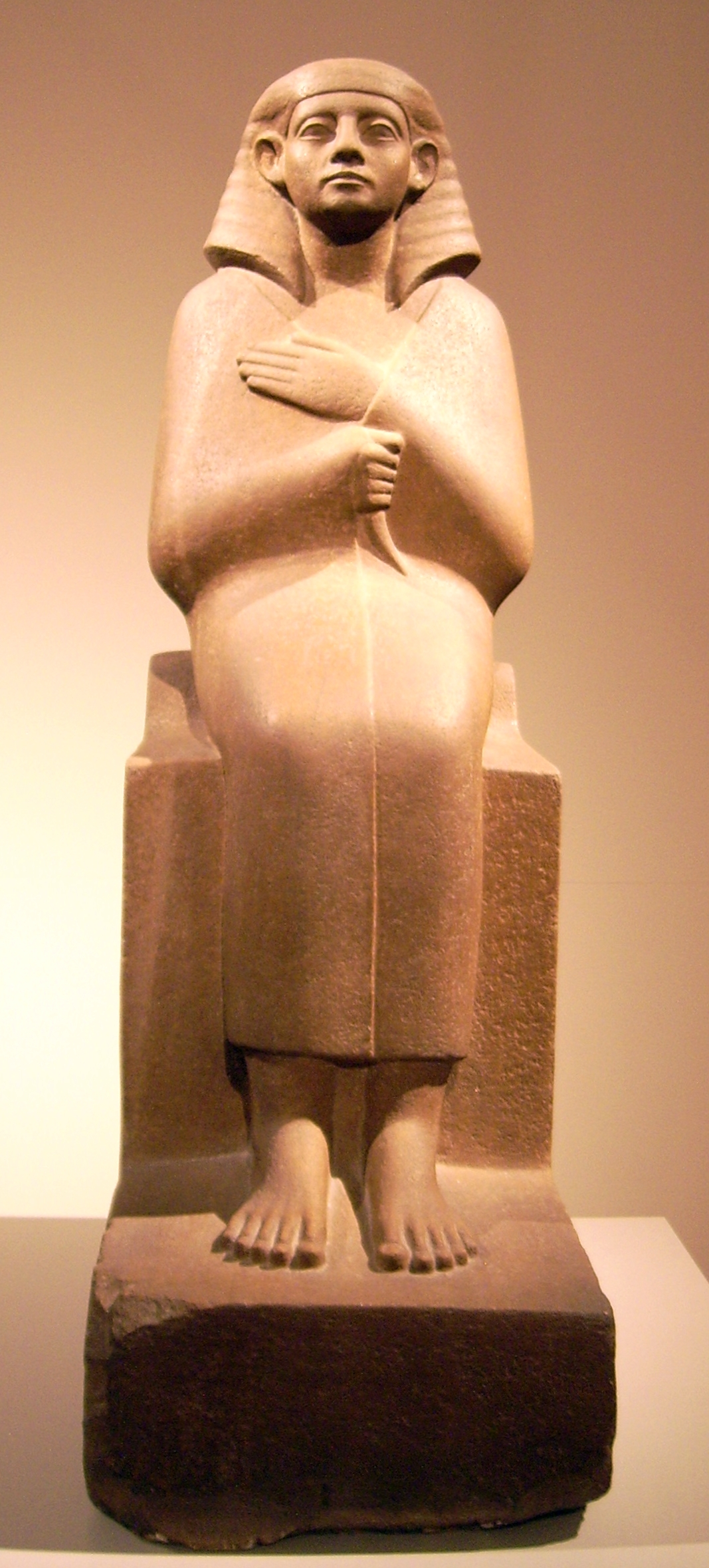 Sitzfigur des Chertihotep, ÄM 15700